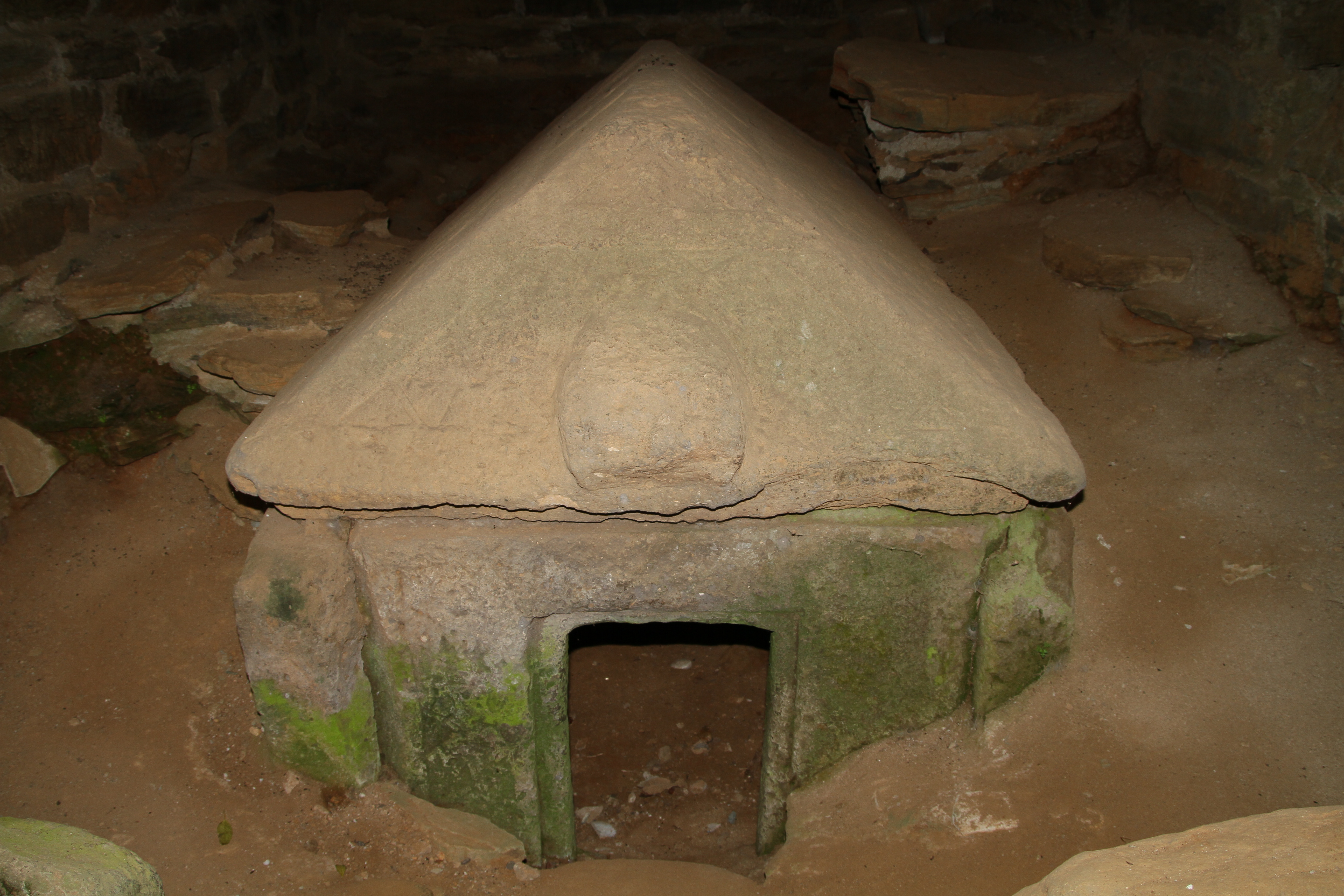 石人山古墳の家型石棺